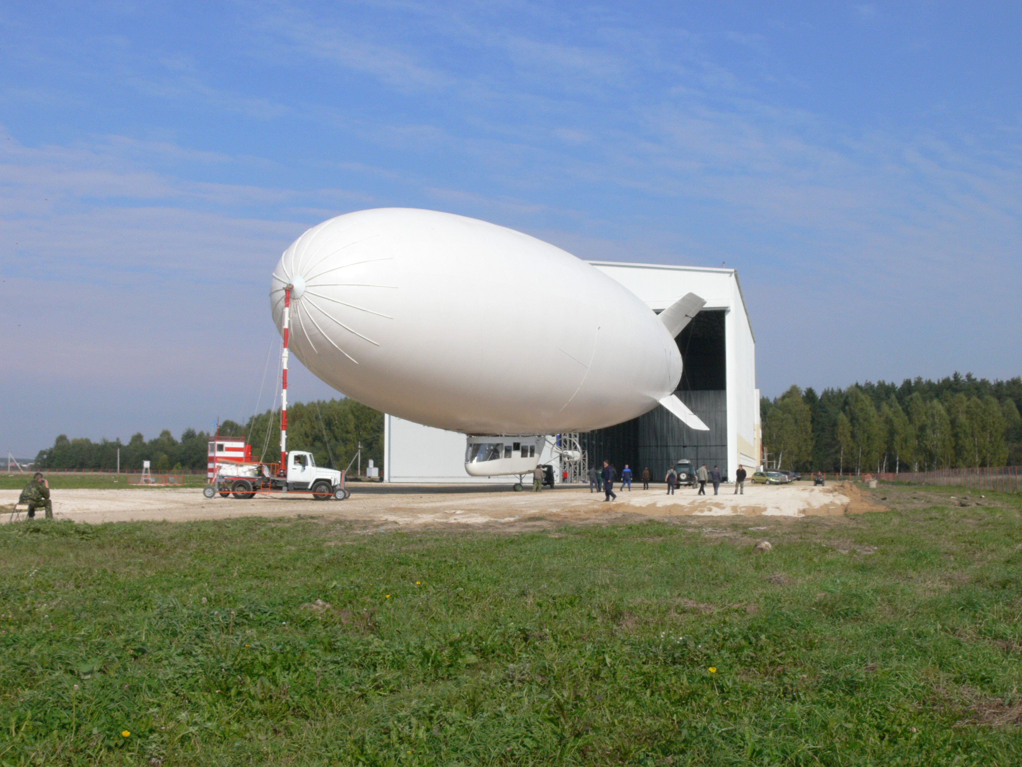 Дирижабль на фоне ангара